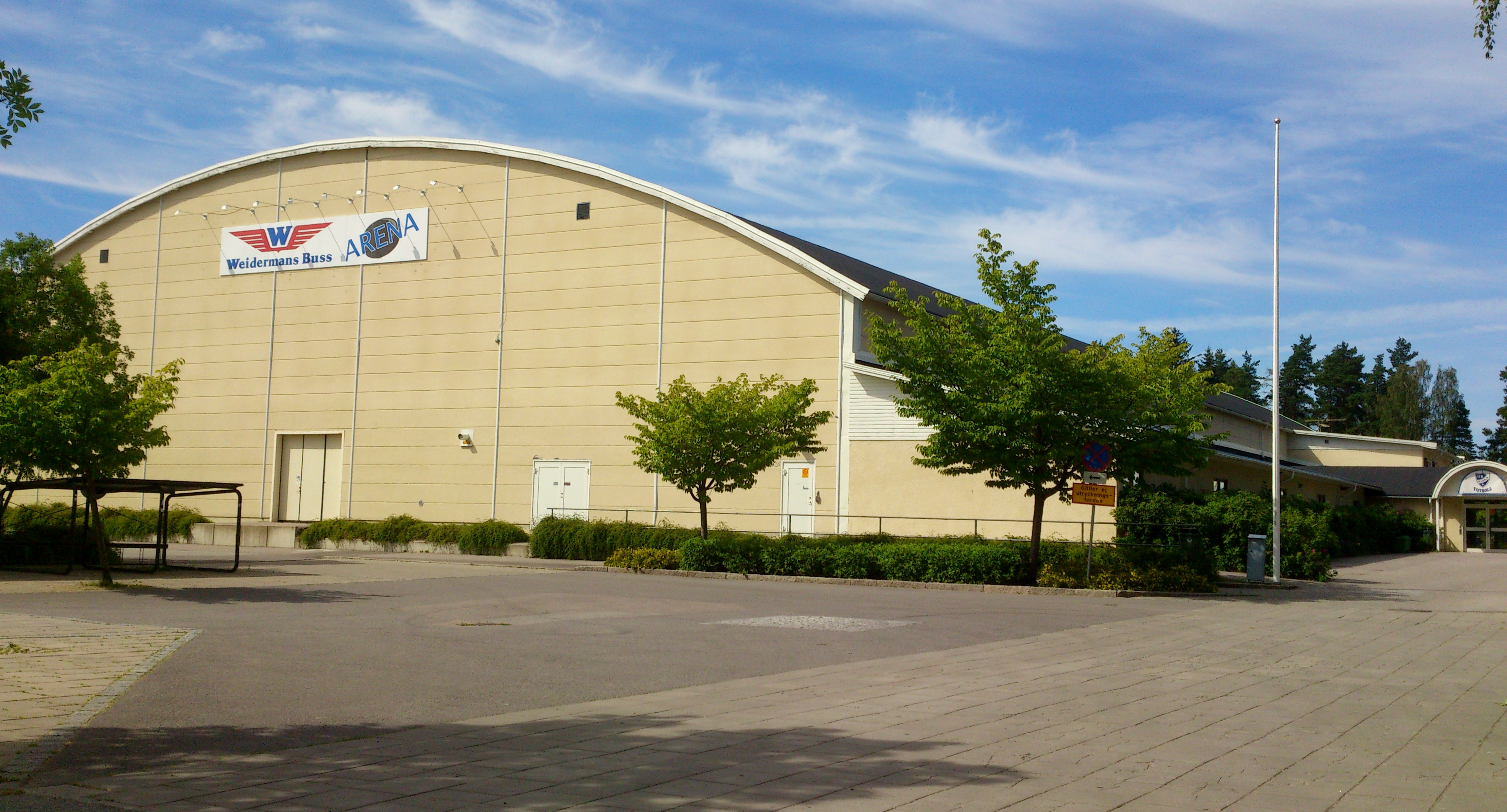 Weidermans Buss Arena i Kumla